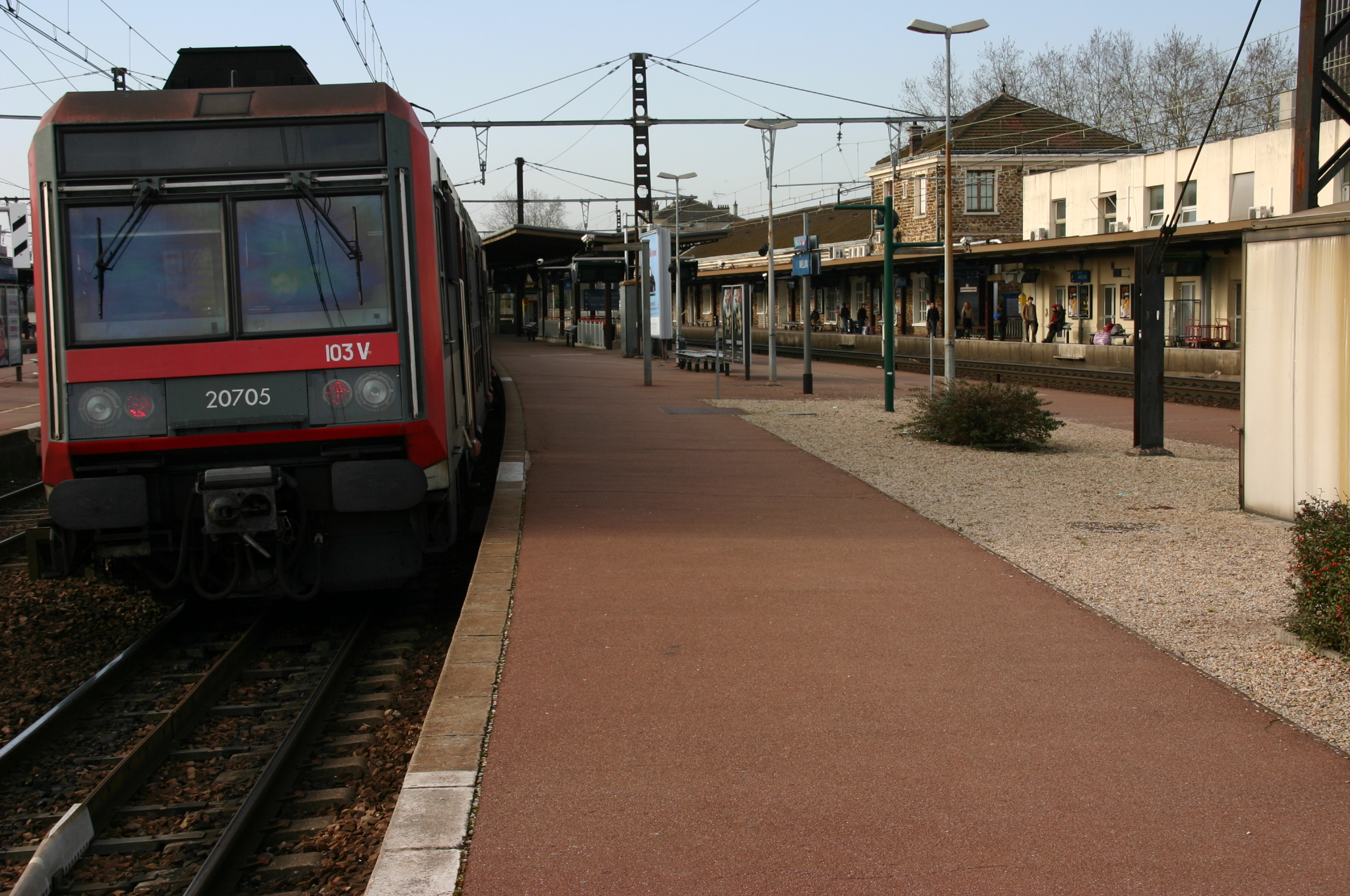 La gare de Melun, Melun, département de la Seine-et-Marne (France)